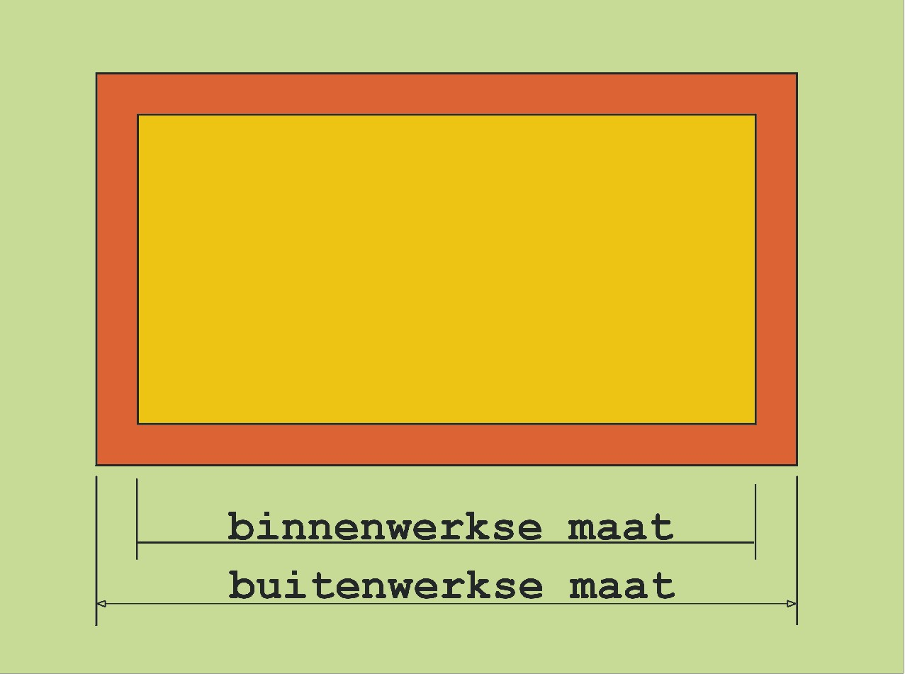 zelfgemaakte tekening voor het publiek domein van Wikipedia. Martink.